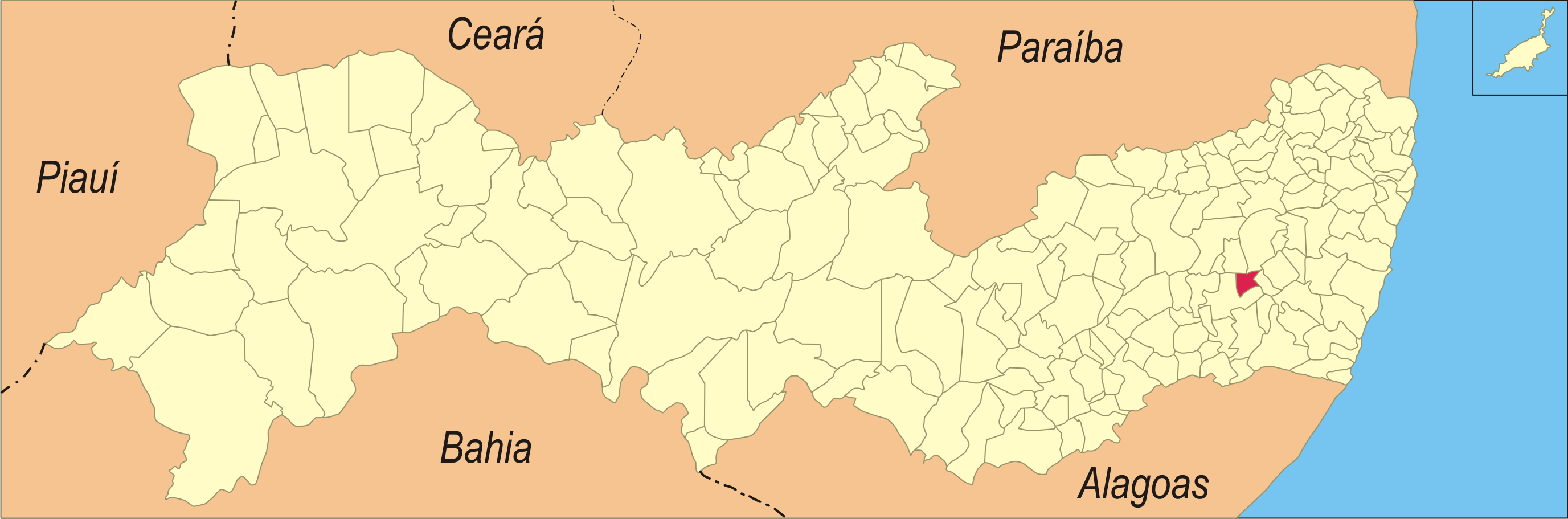 Localização da cidade no estado de Pernambuco